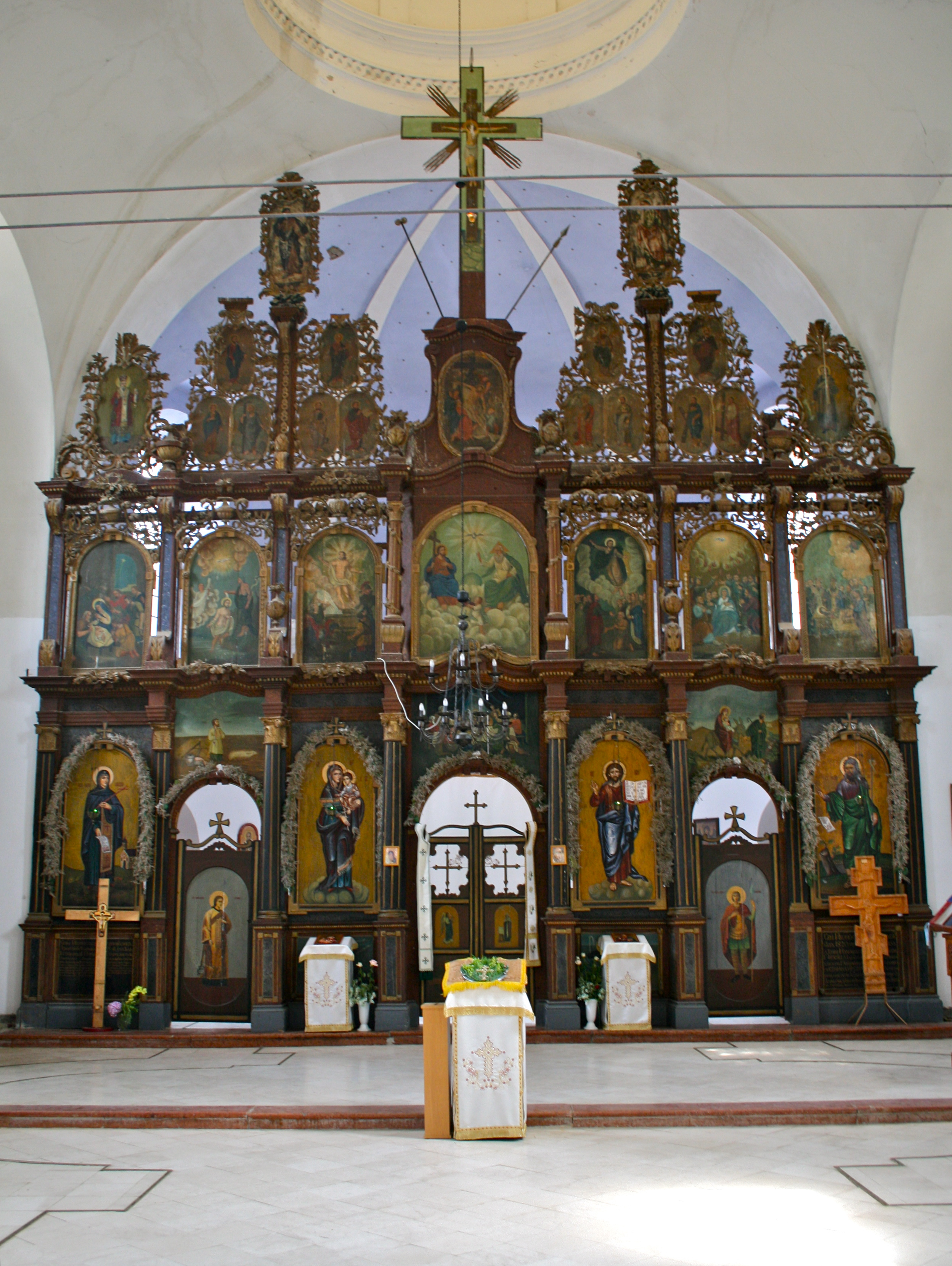 Иконостас цркве манастира резао је 1798. познати новосадски дуборезац ( "пилтаор") Аксентије Марковић